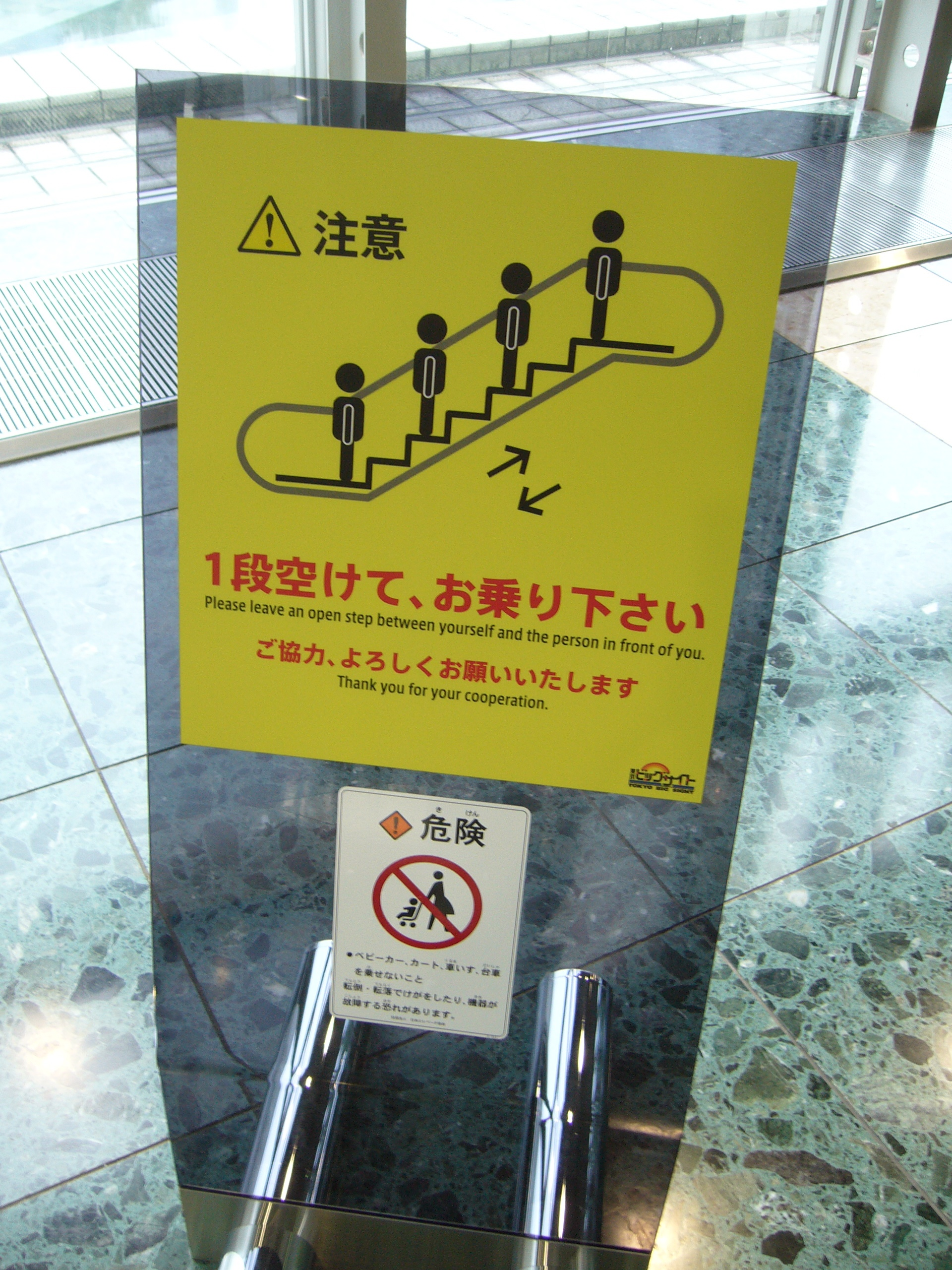 去年のワンフェス以降に設置された、エスカレータ使用時の注意書き